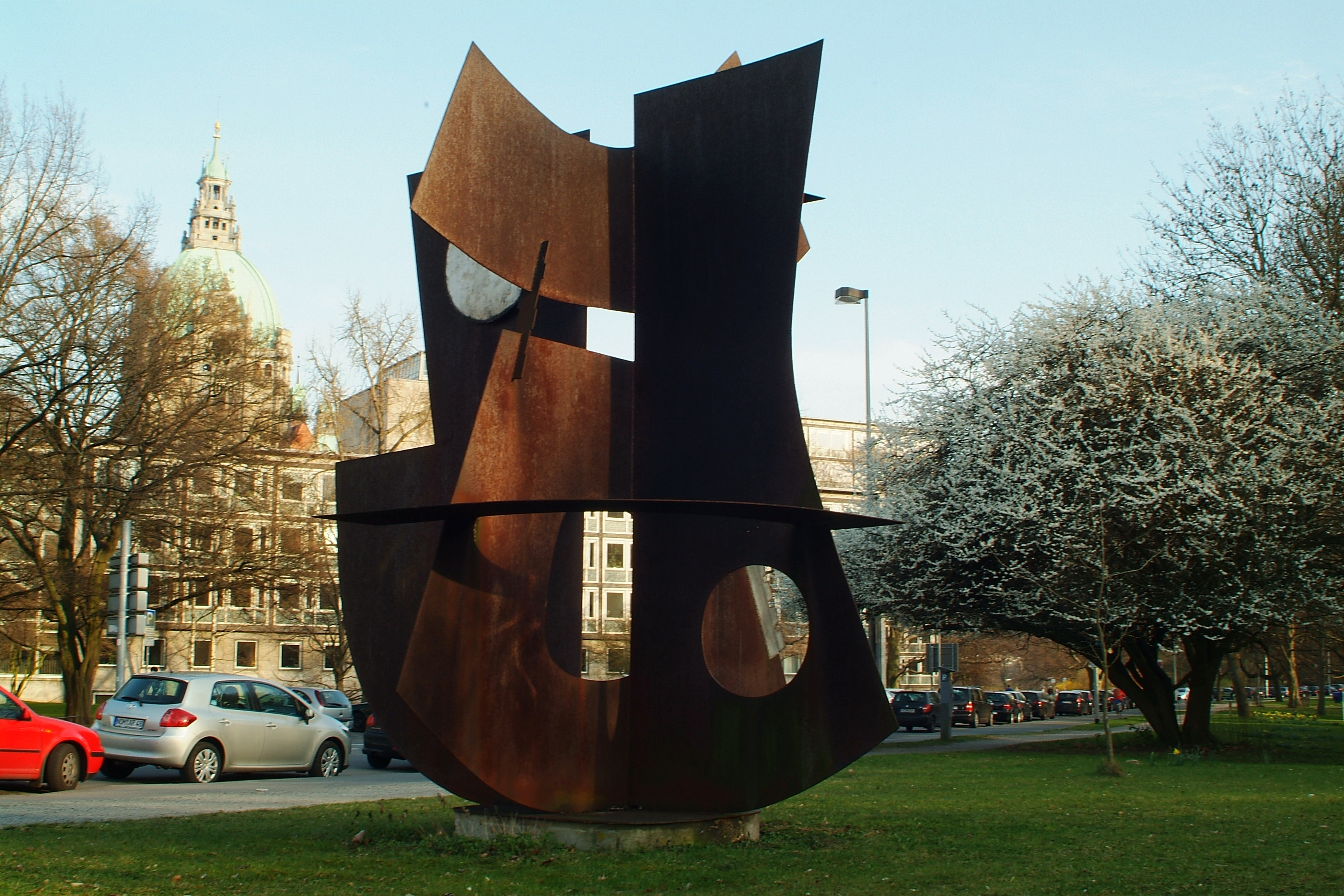 Die Stahlplastik Ile de France von Berto Lardera wurde ursprünglich 1967 vor dem Niedersächsischen Landesmuseum aufgestellt. Nach einem Intermezzo im Sprengel Museum wurde sie anschließend an der Culemannstraße/Ecke Friedrichswall platziert.